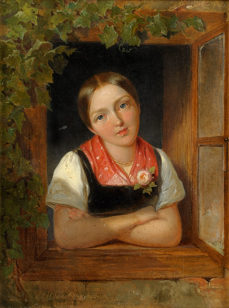 Fesches Dirndl